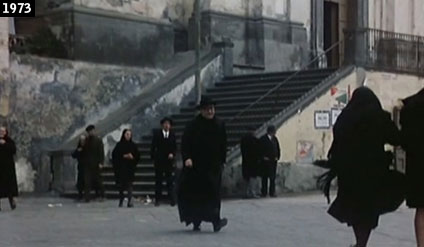 Fotogramma della scena del Film Lucky Luciano girata nel 1973 che raffigura le scale di ingresso della Chiesa San Giacomo Apostolo in Piazza Amodio.